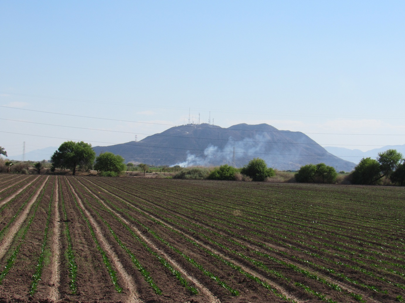 Desde el acceso sur de Michoacán de Ocampo, B. C. se toma esta imagen de Cerro Prieto. al pie algunos de los campos agrícolas circundantes.